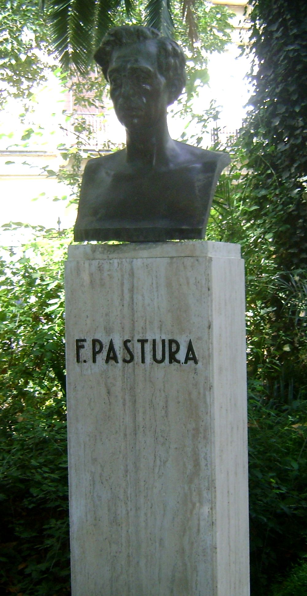 Francesco Pastura - giardino bellini - settembre 2010